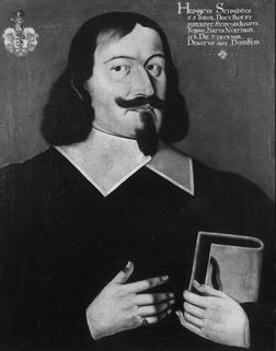 Gemälde in der Tübinger Professorengalerie